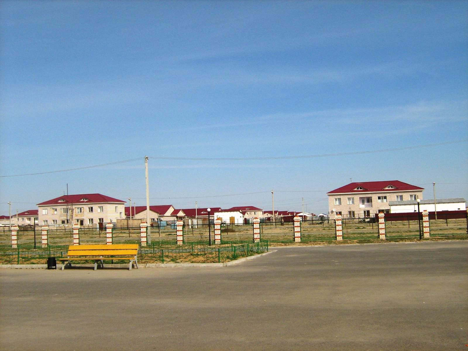 Қазақша (кирил): село Жана Каратон